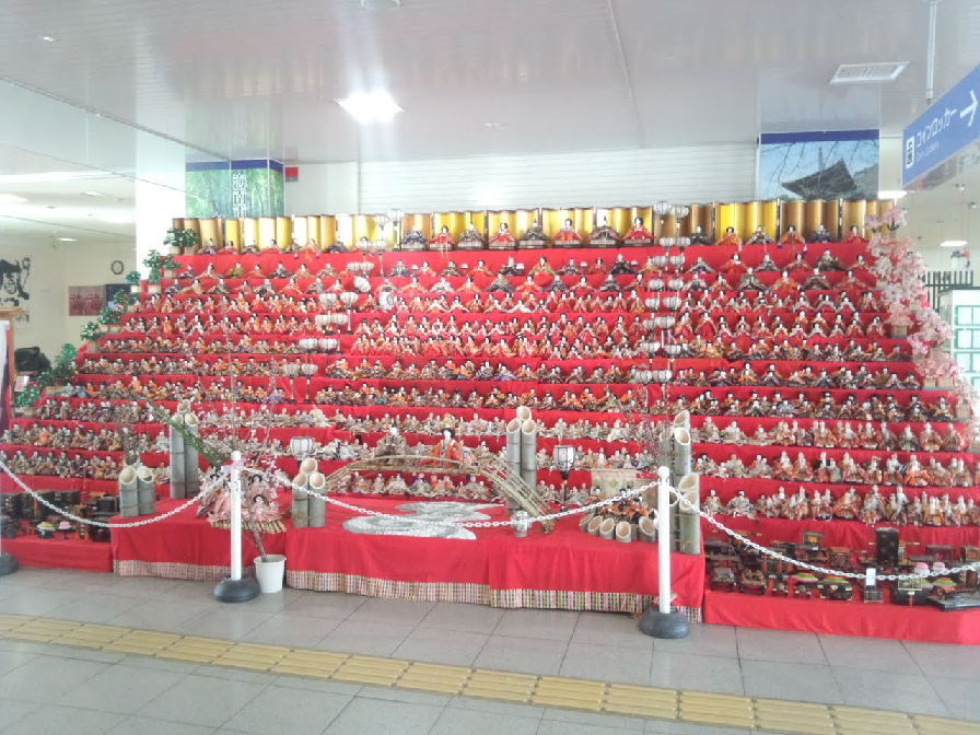 海南駅の大雛壇